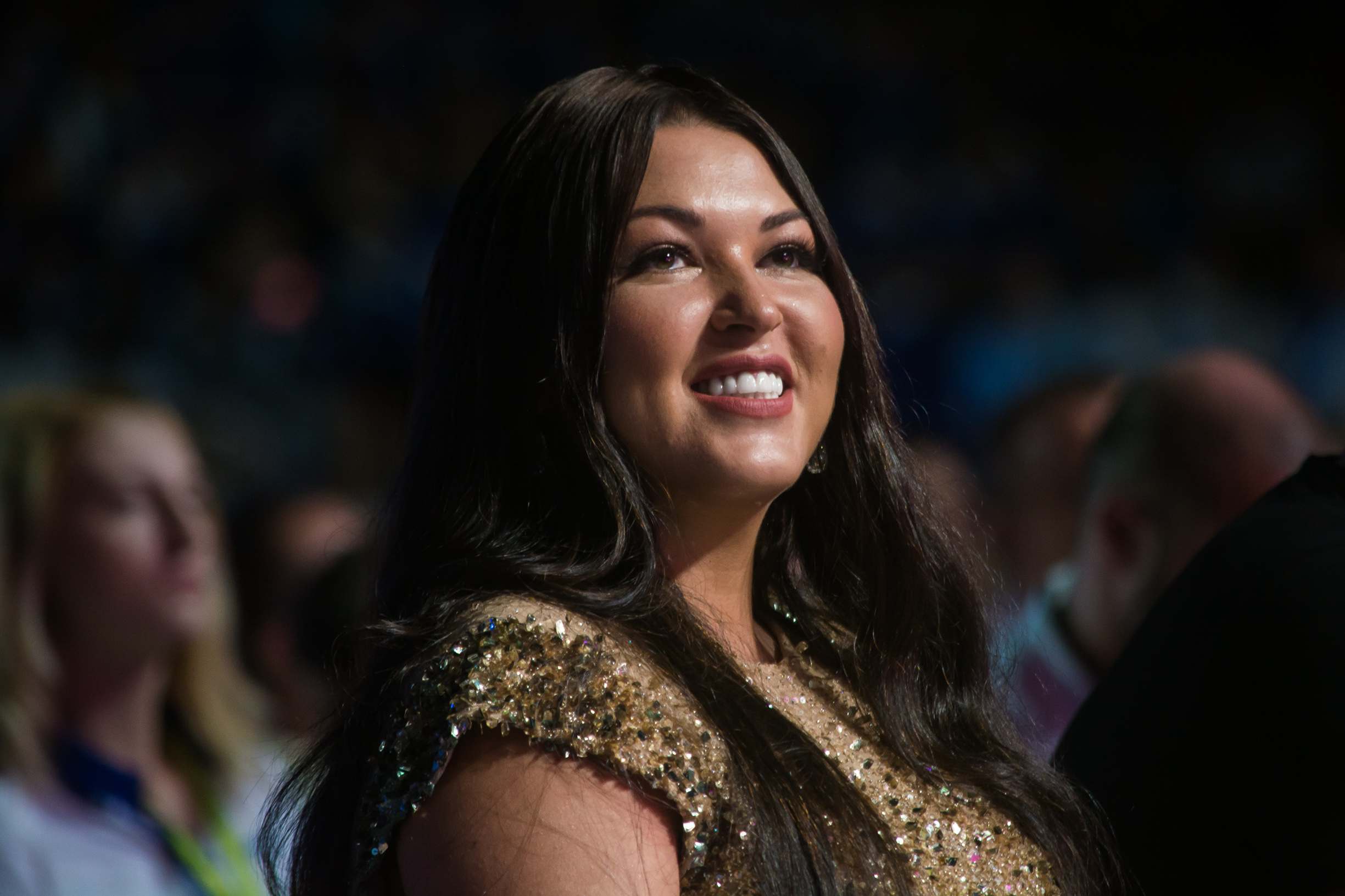 Ирина Дубцова в жюри Детской Новой волны 2016